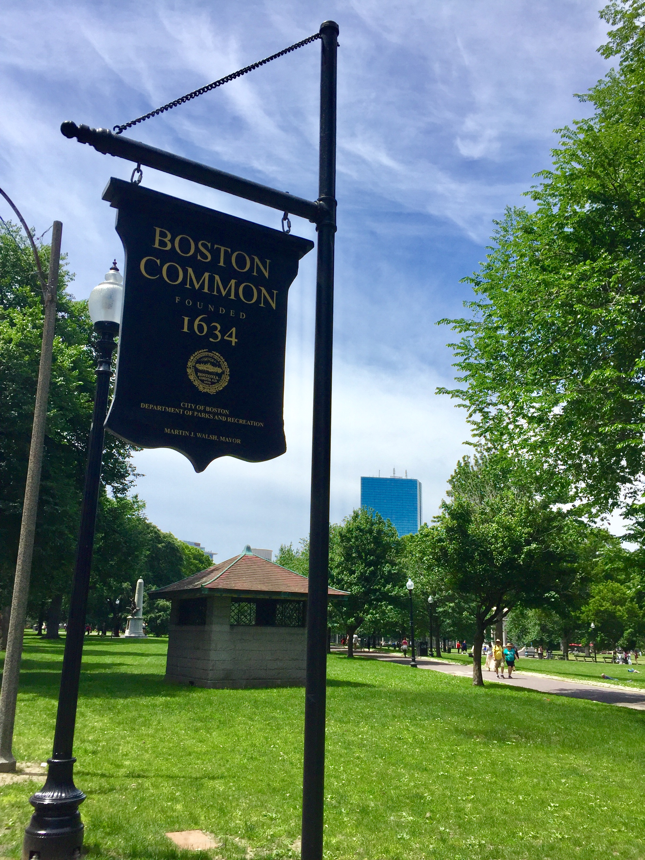 Lletreru indicativu del Boston Common.